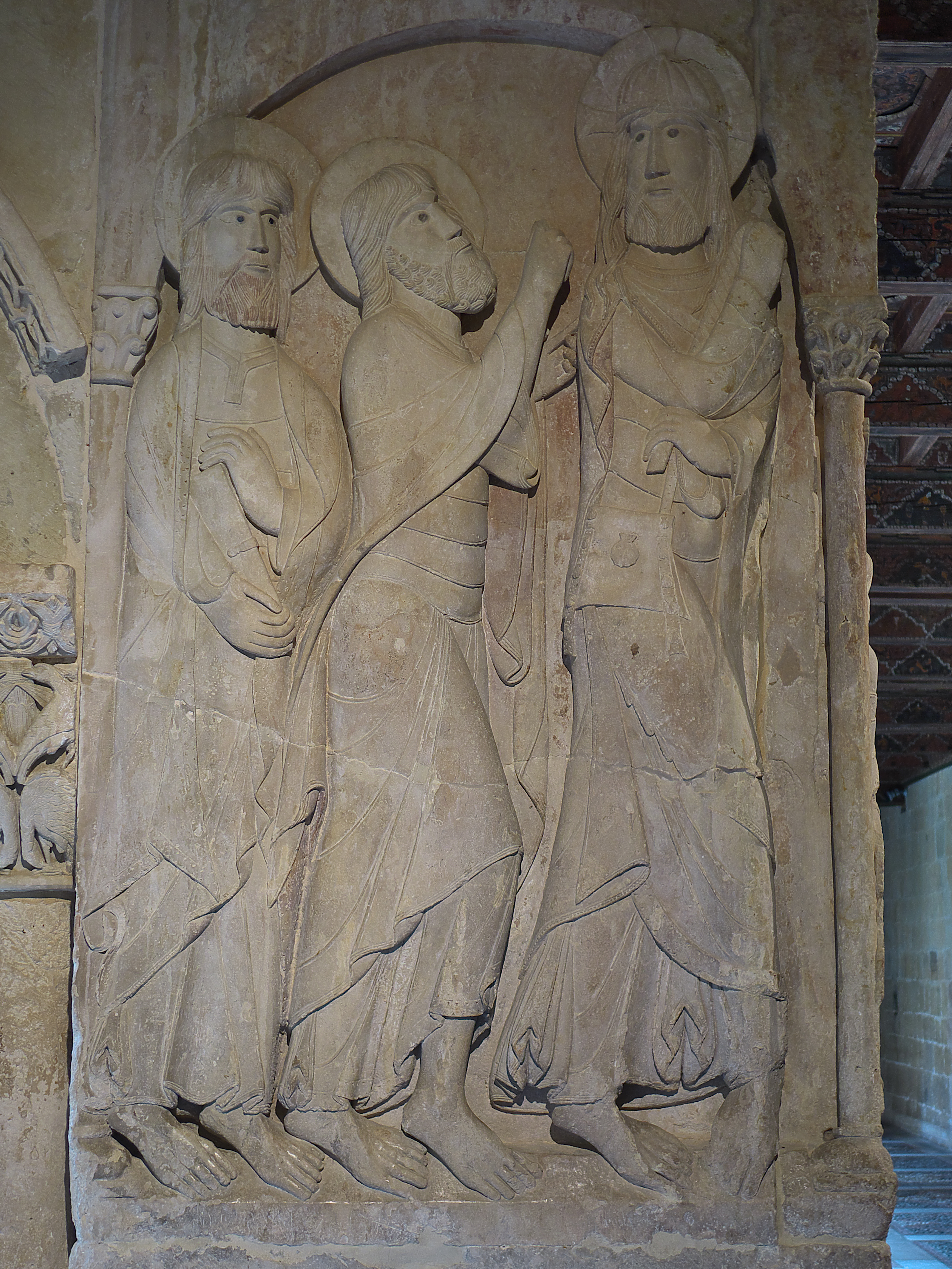 Aquel mismo día, dos de ellos iban caminando a una aldea llamada Emaús, distante de Jerusalén a unos sesenta estadios. Evangelio de Lucas. Cara interior del machón noroeste del claustro inferior del Monasterio de Santo Domingo de Silos. El primer maestro, a finales del siglo XI, esculpe el bajo relieve con esquema compositivo y perfección artística incuestionable, valorado entre lo mejor del arte románico. El hieratismo de sus figuras se confunde con la plasticidad y el movimiento, consiguiendo transmitir el mensaje evangélico al observante.